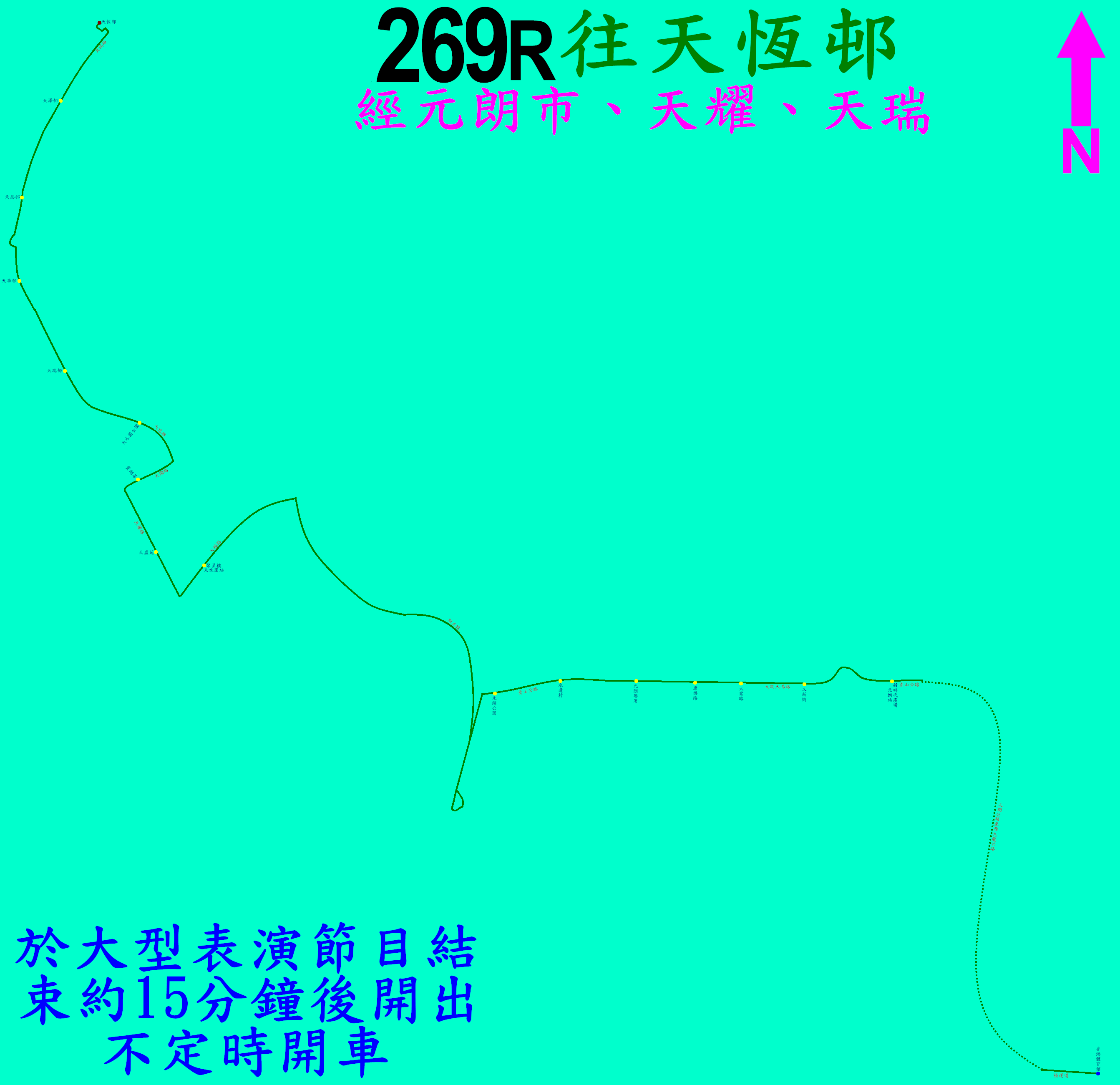 中文（香港）: 九巴269R線的走線圖